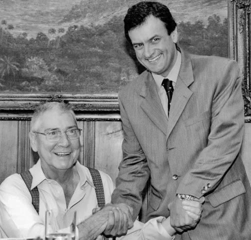 O deputado federal Aécio Neves e o governador de São Paulo Mário Covas em cerca de 1999.